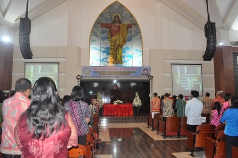 GPM Maranatha, gereja utama Ambon